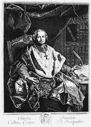 Portrait de Joachim Colbert, gravure de François Chéreau d'après Jean Raoux